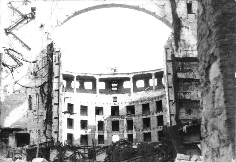 Dresden, zerstörte Semperoper ADN-ZB / J. Zimmermann / 17.1.85 [Herausgabedatum] Dresden: Semperoper Die weltberühmte Dresdner Semperoper wurde in der Nacht vom 13. zum 14. Februar 1945 durch anglo-amerikanische Bomben zerstört. Die letzte Aufführung vor der Schließung der Oper durch die Faschisten fand am 31. August 1944 mit Webers "Freischütz" statt.